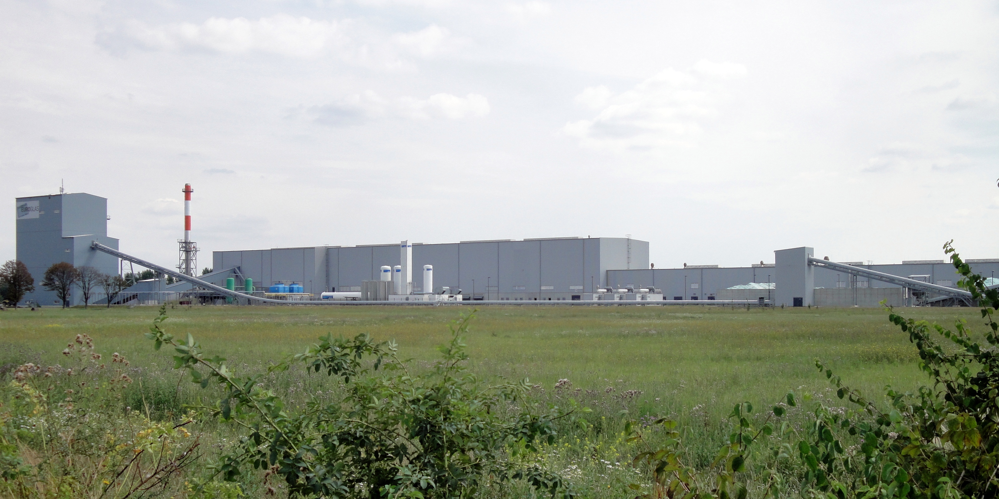 Euroglas-Glaswerk in Osterweddingen